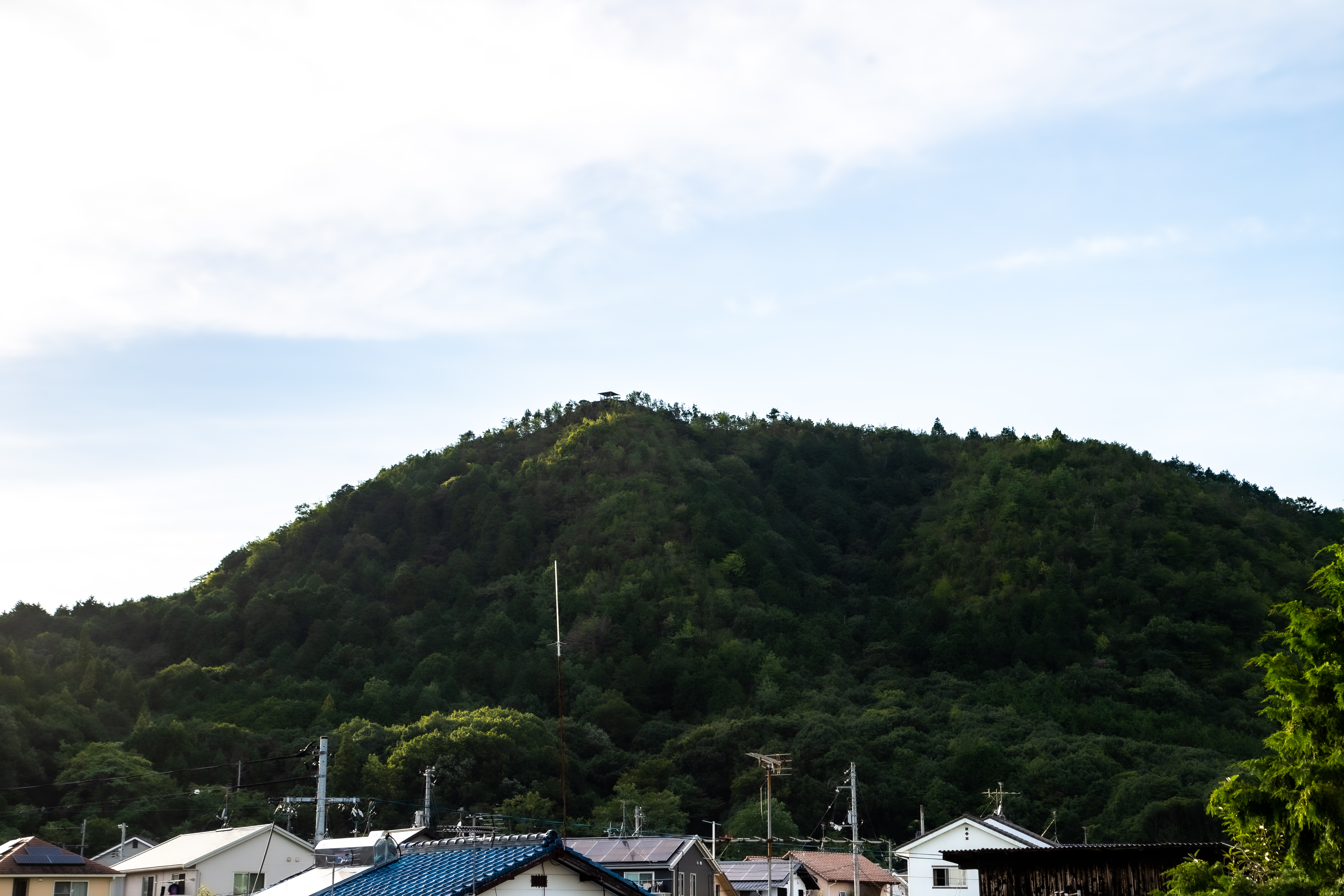 山口県岩国市の鞍掛山、中世には鞍掛山城という城があった。